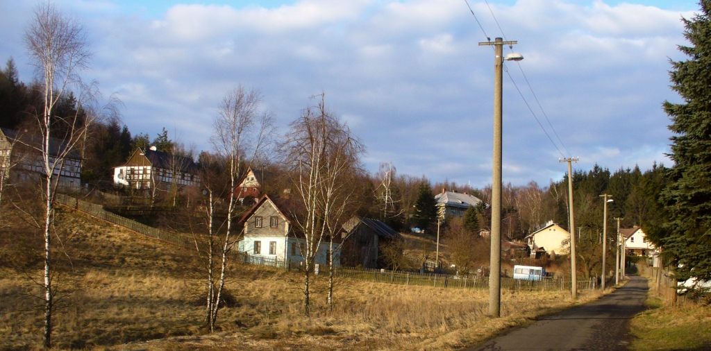 Maxičky - stará zástavba v severní části osady